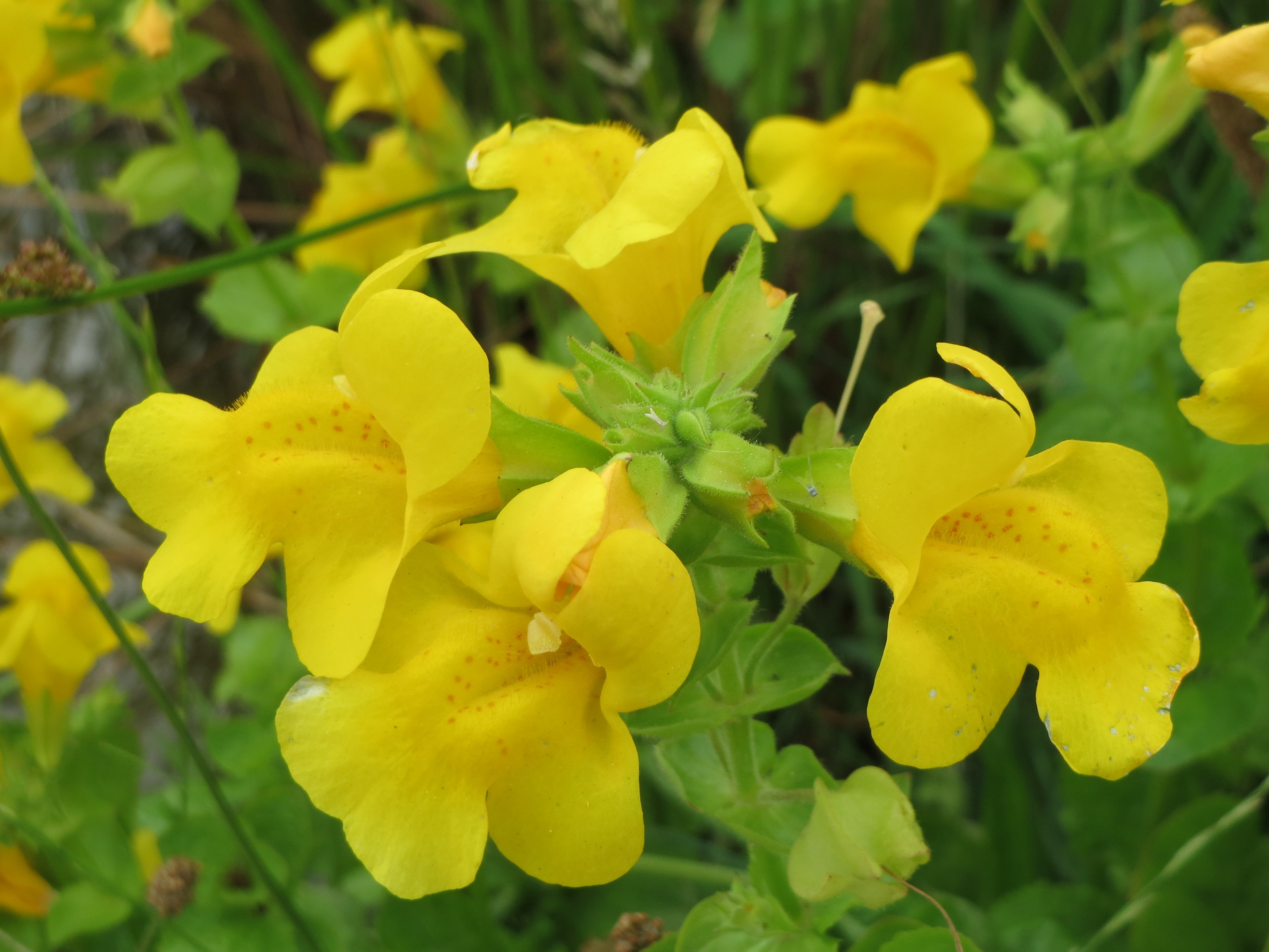 Gelbe Gauklerblume (Mimulus guttatus) im Bürgerpark Saarbrücken